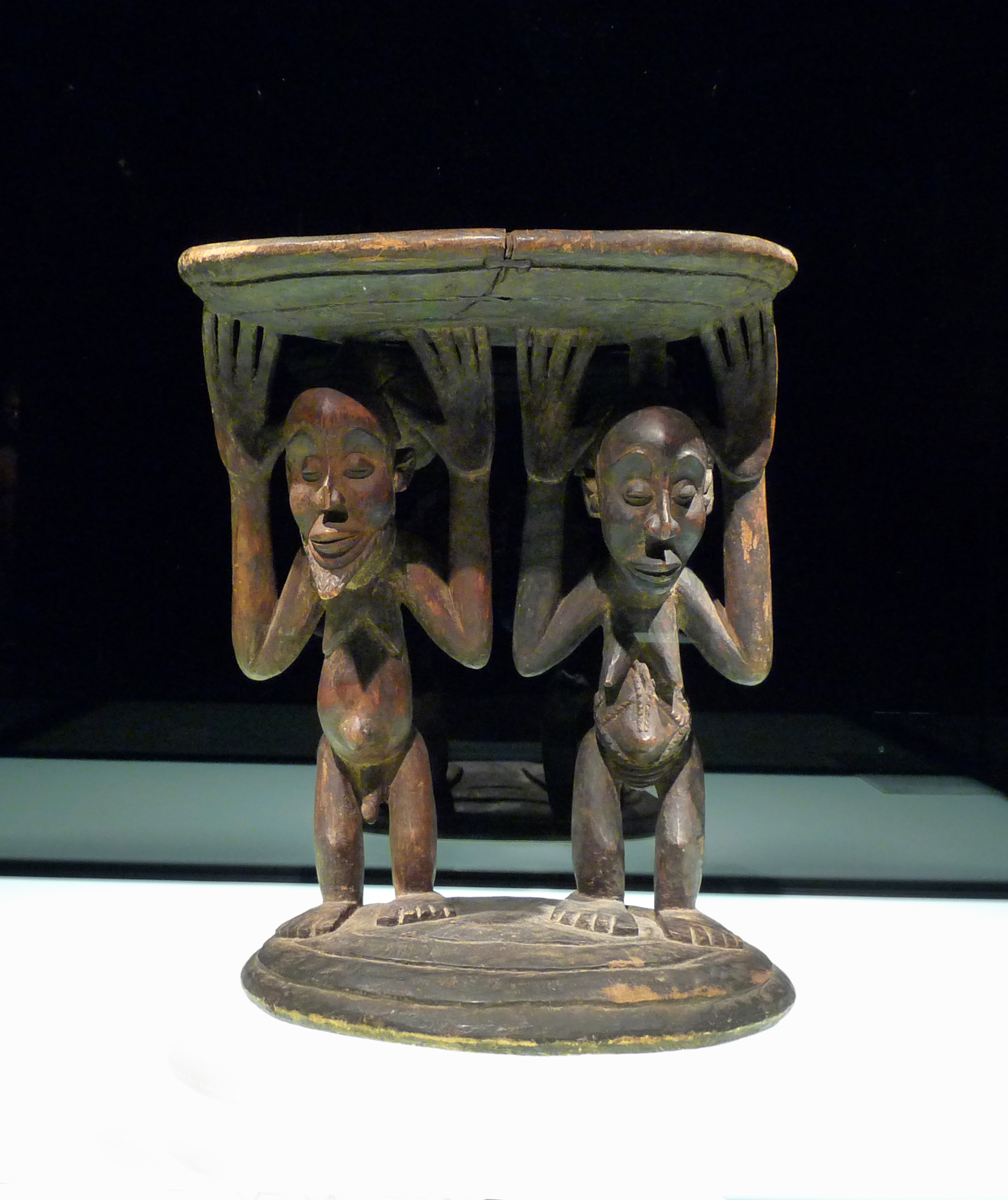 Tabouret à cariatides luba, en bois, République démocratique du Congo, 19e siècle (Musée ethnologique de Berlin)